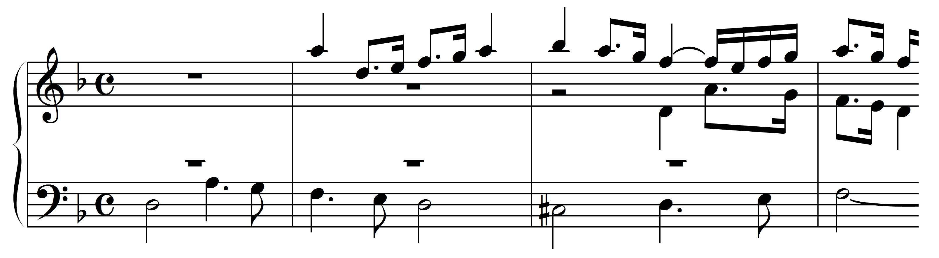 Bach, JS, Incipit Contrapunctus 6, BWV 1080